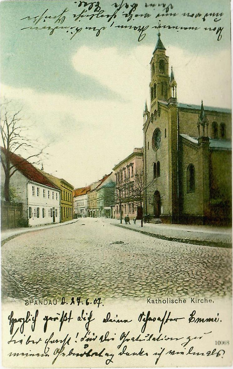 Kirche St. Marien am Behnitz, Berlin-Spandau Ansicht auf einer Postkarte von 1907 Quelle: Helmut Kißner, Cordia Schlegelmilch: Die Kirche St. Marien am Behnitz in Spandau. Ein vergessenes Werk August Sollers. Nicolaische Verlagsbuchhandlung GmbH, Berlin 2004, S. 55